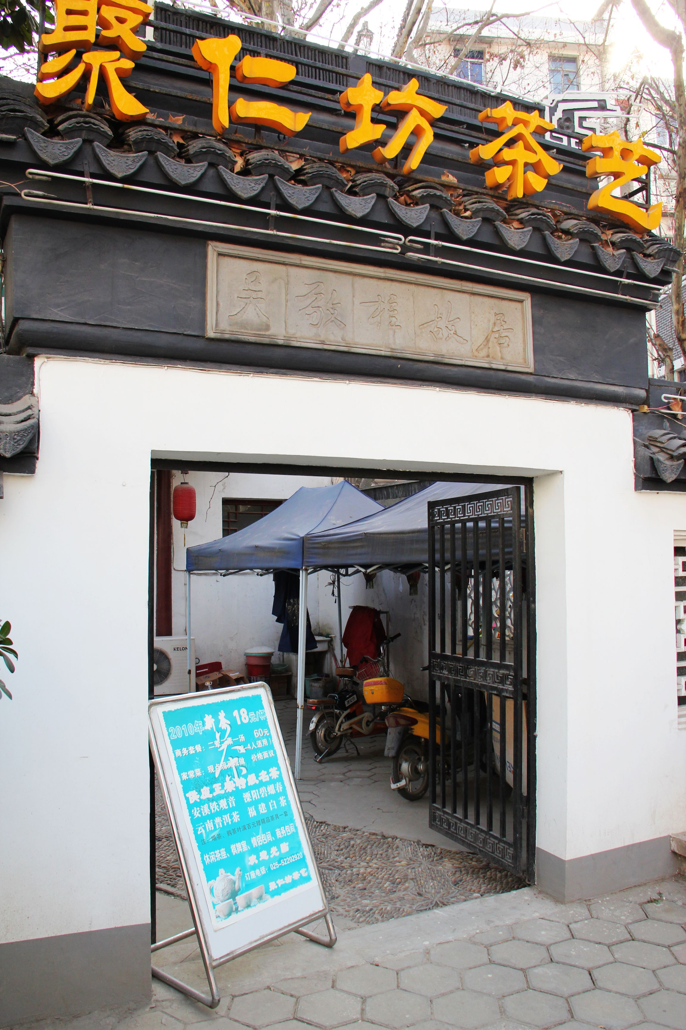 南京桃叶渡8号吴敬梓故居陈列馆，1997年重建。